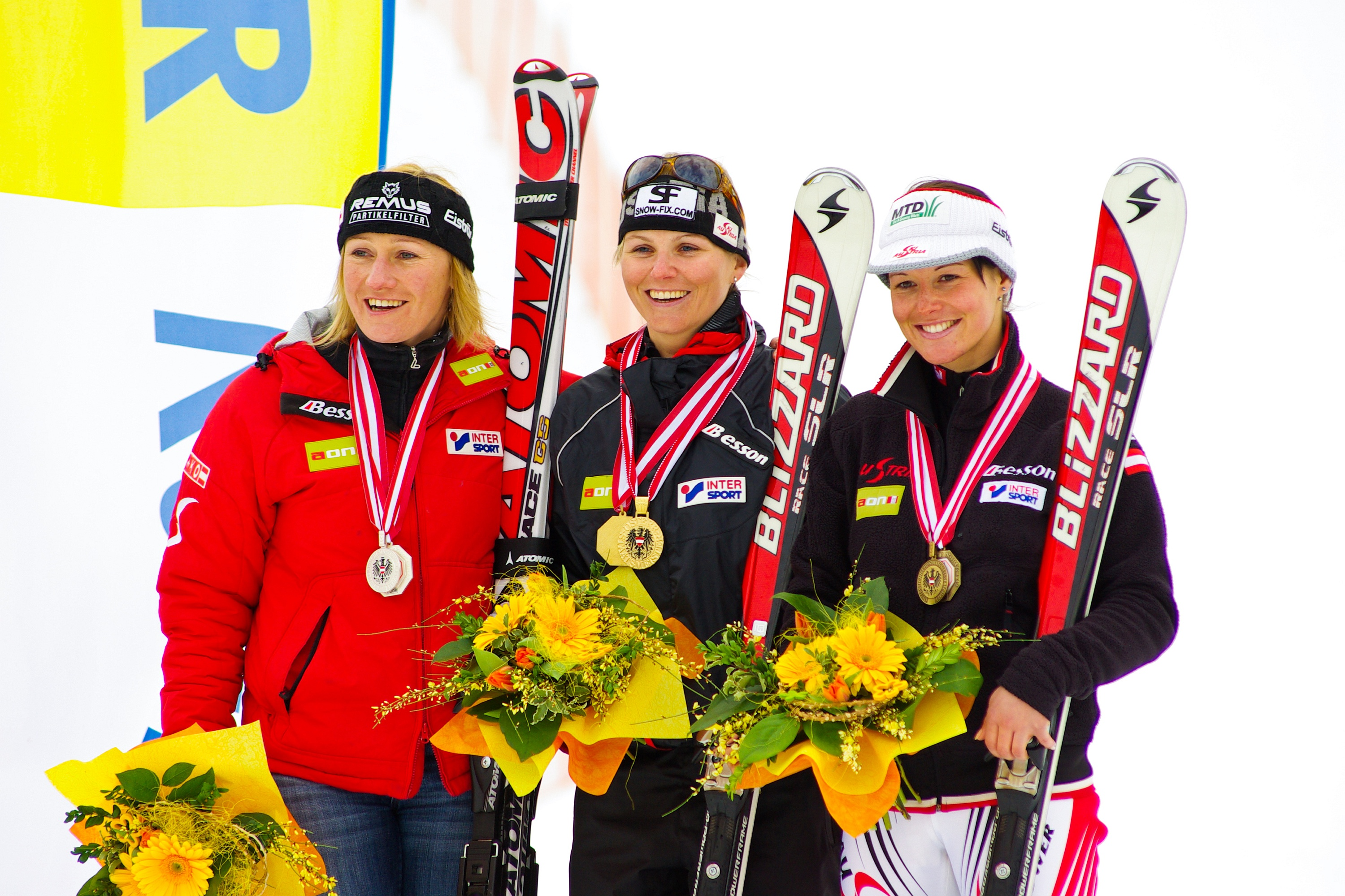 Die Siegerinnen des Super-G der Österreichischen Alpinen Skimeisterschaften 2008: 1. Platz: Silvia Berger (mitte), 2. Platz: Renate Götschl (links), 3. Platz: Stefanie Köhle (rechts)